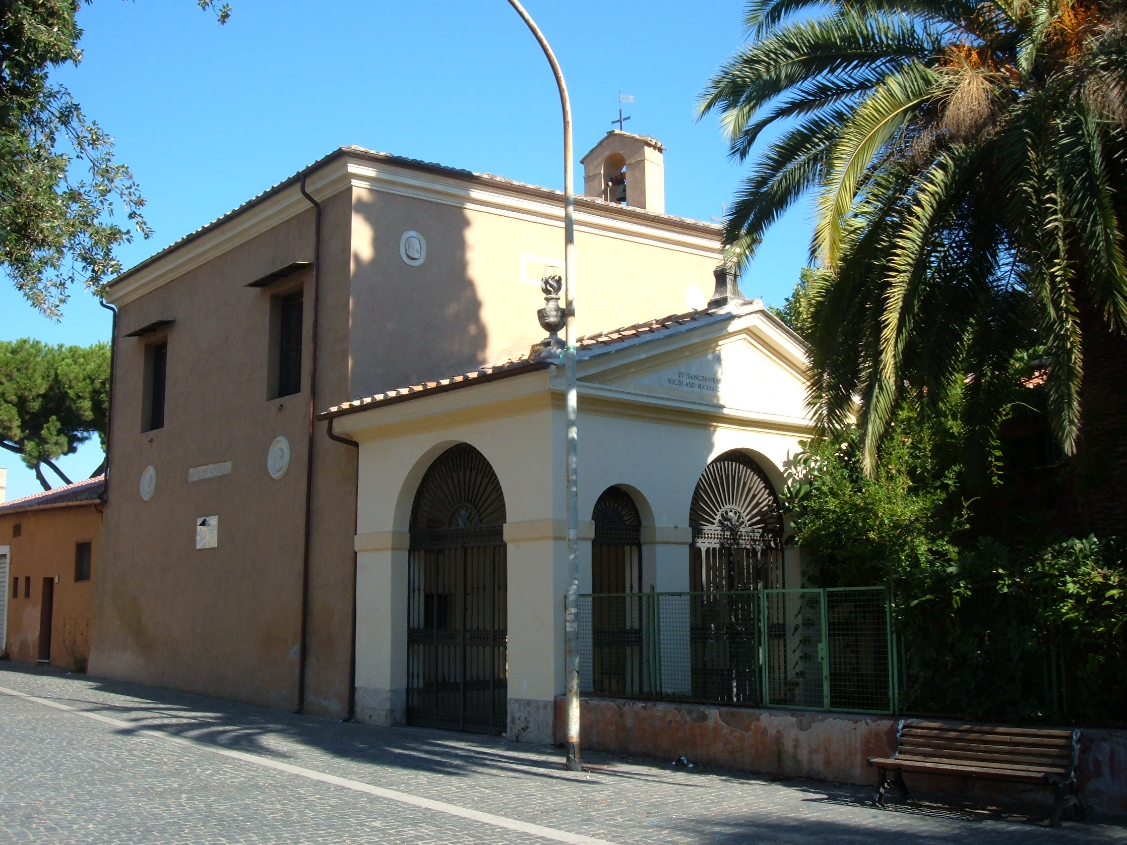 La chiesa dei Santi Isidoro ed Eurosia nel quartiere Ostiense a Roma.